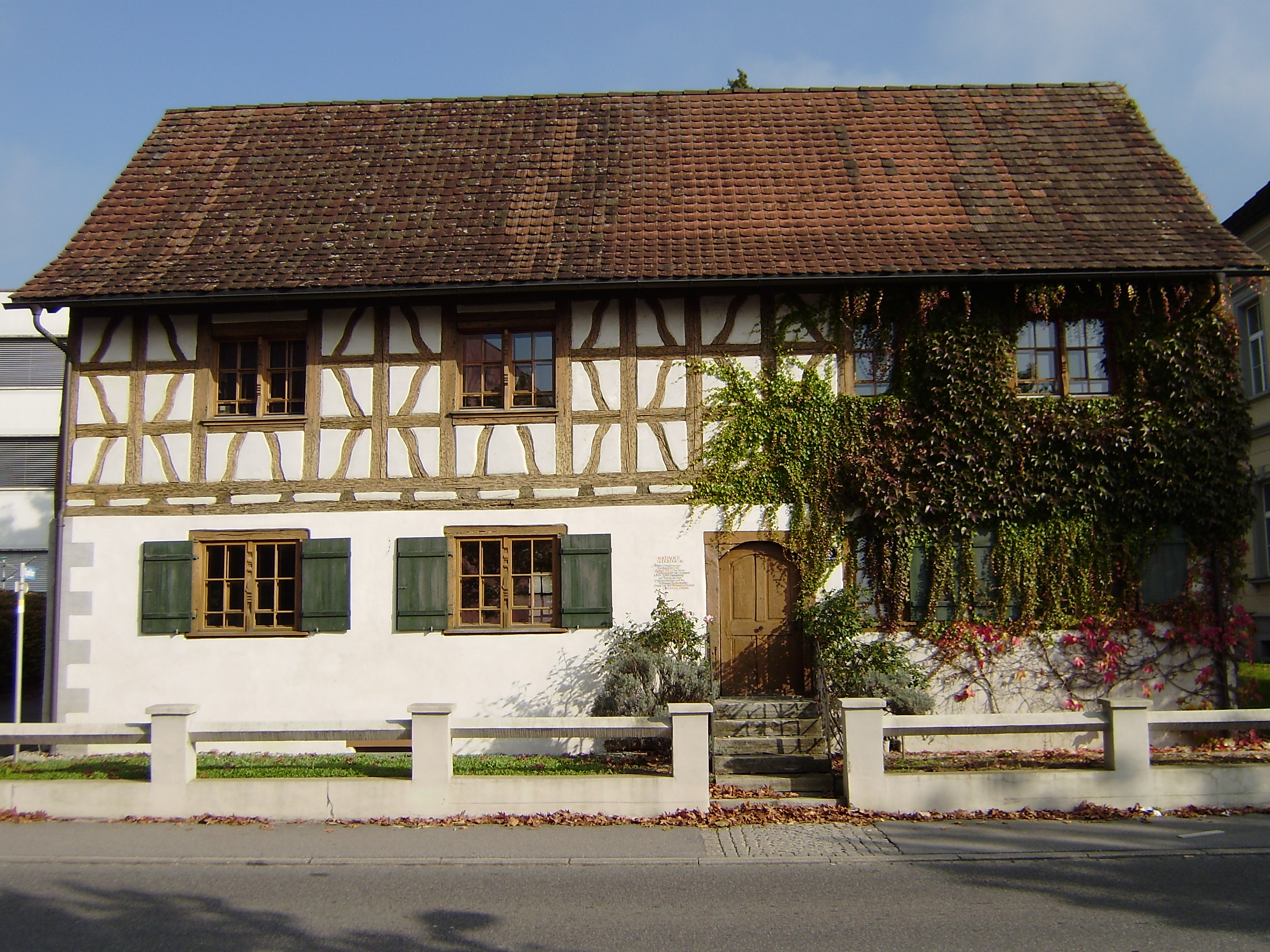 Museum/Ausstellungsbau, Schule, Altes Schulhüsle